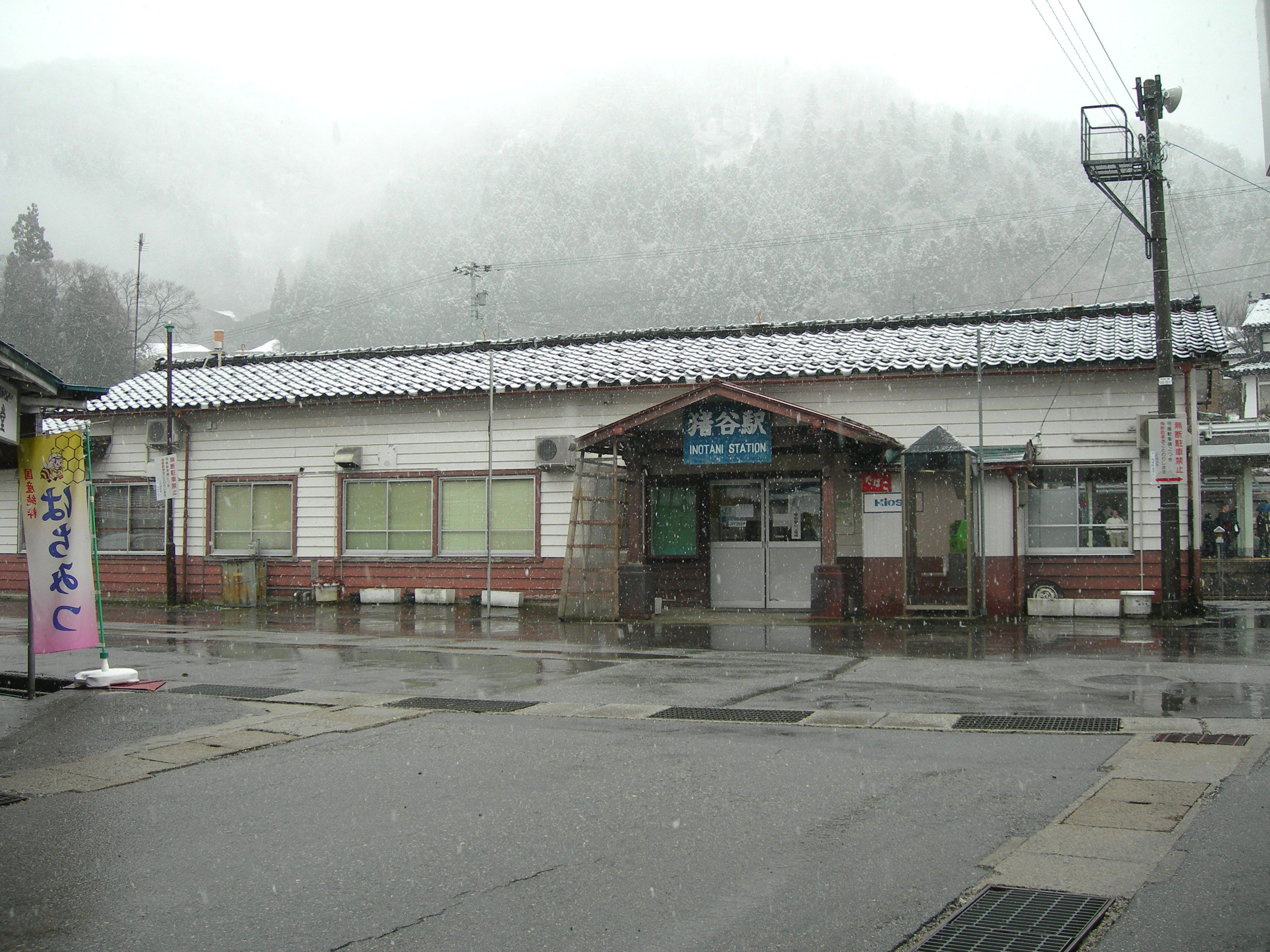 猪谷駅